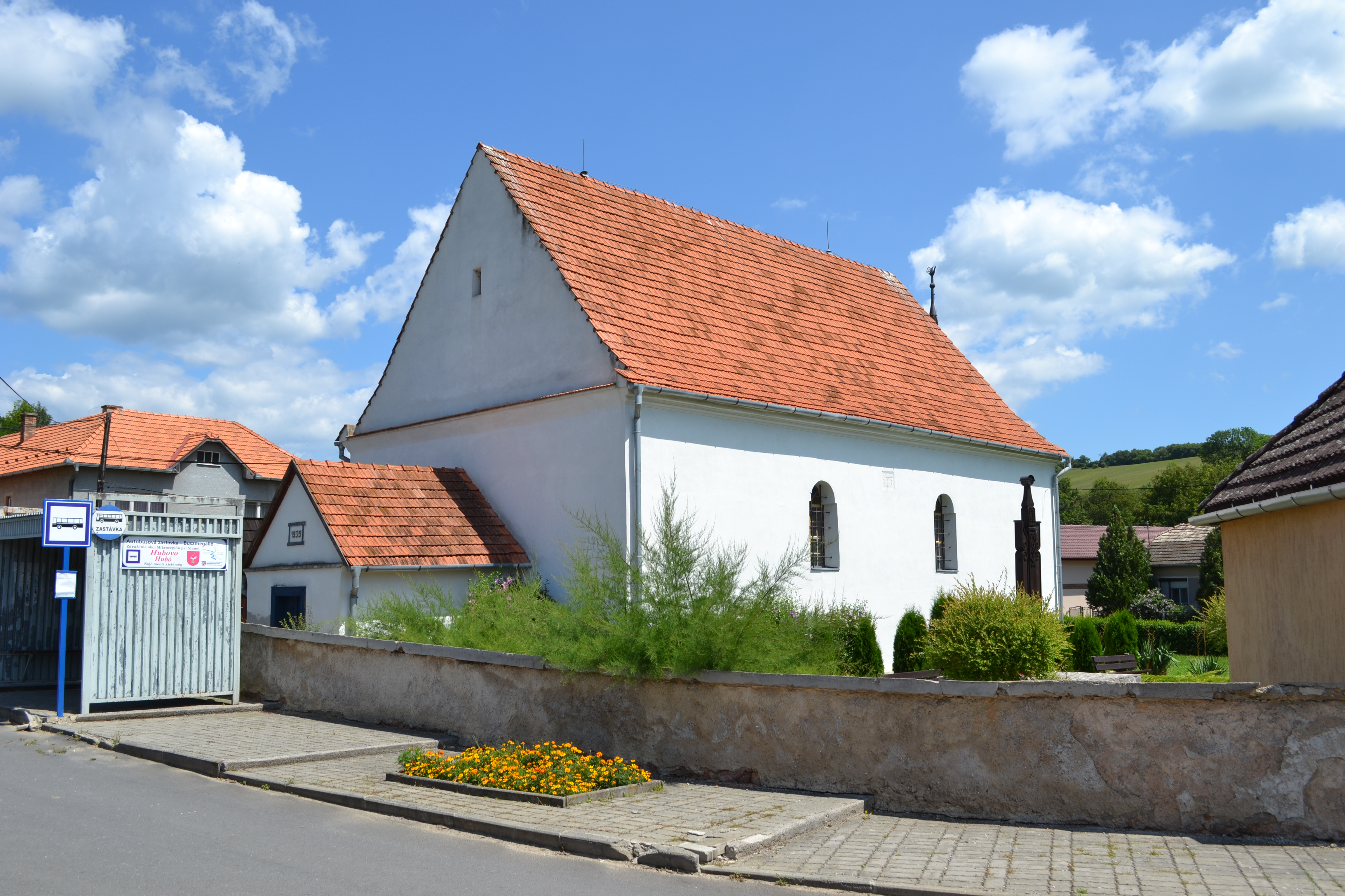 Reformovaný kostol z roku 1776